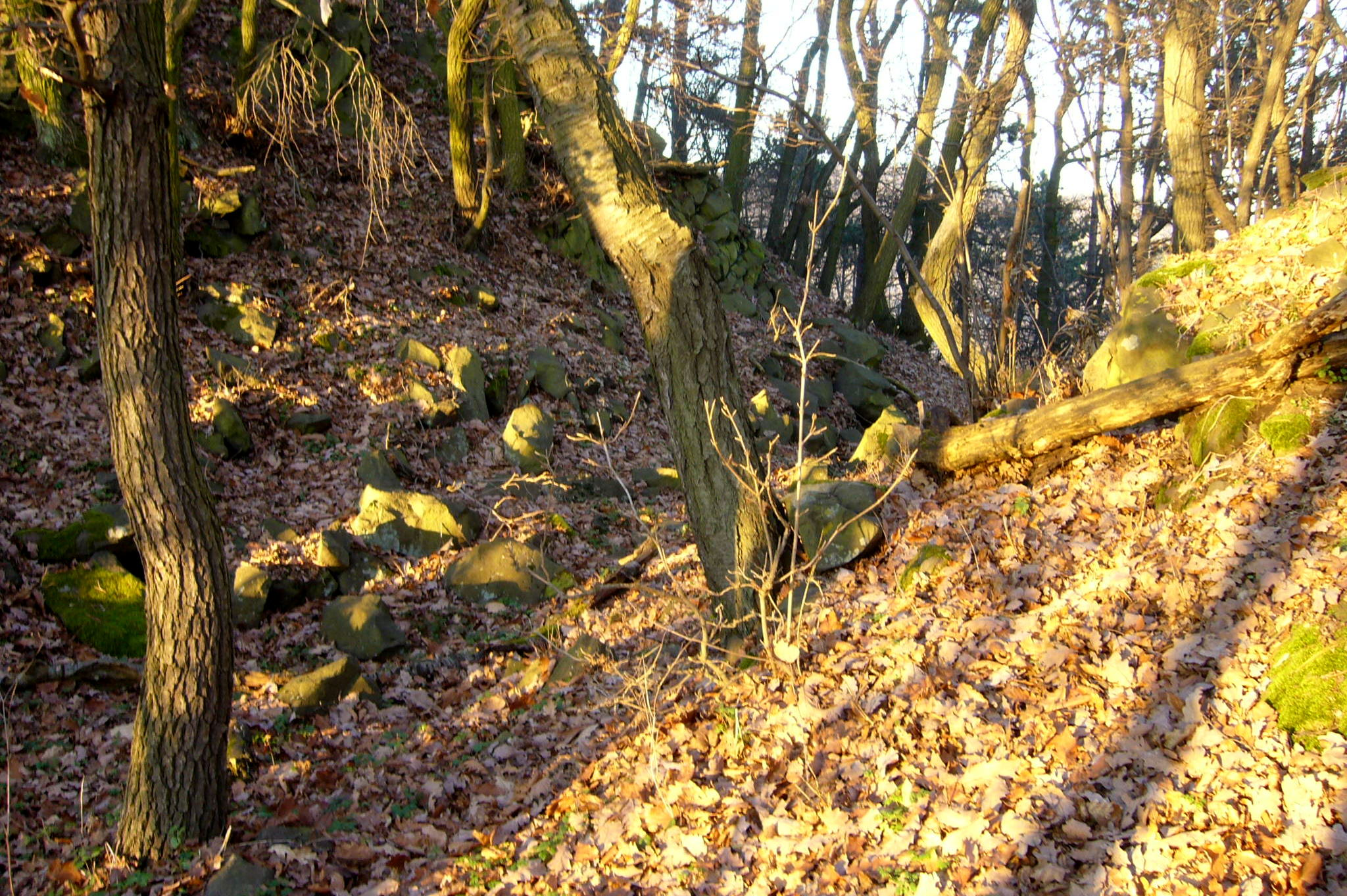 Hrad na Blešenském vrchu - příkop mezi jádrem a předhradím